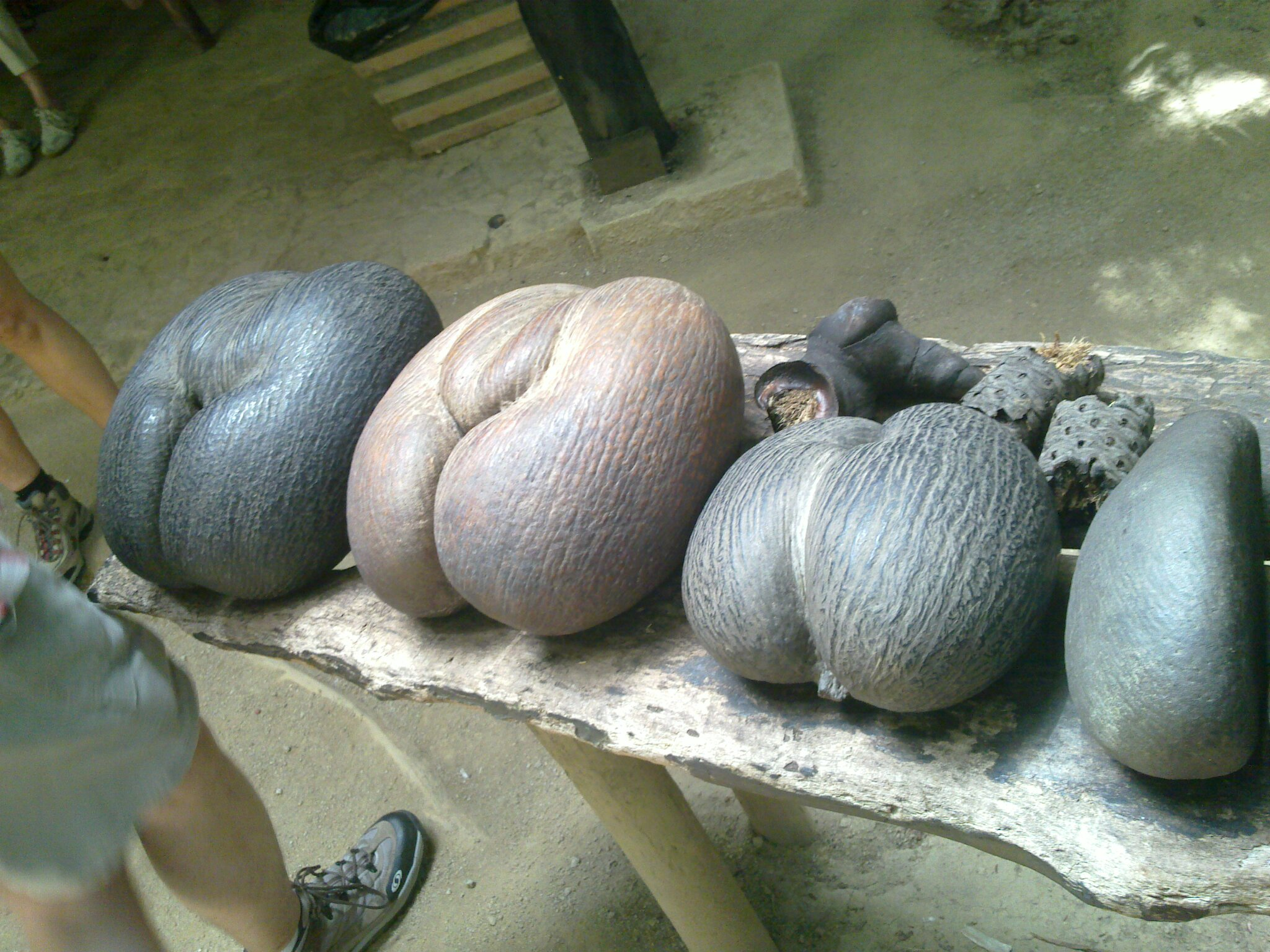 coco de mer.